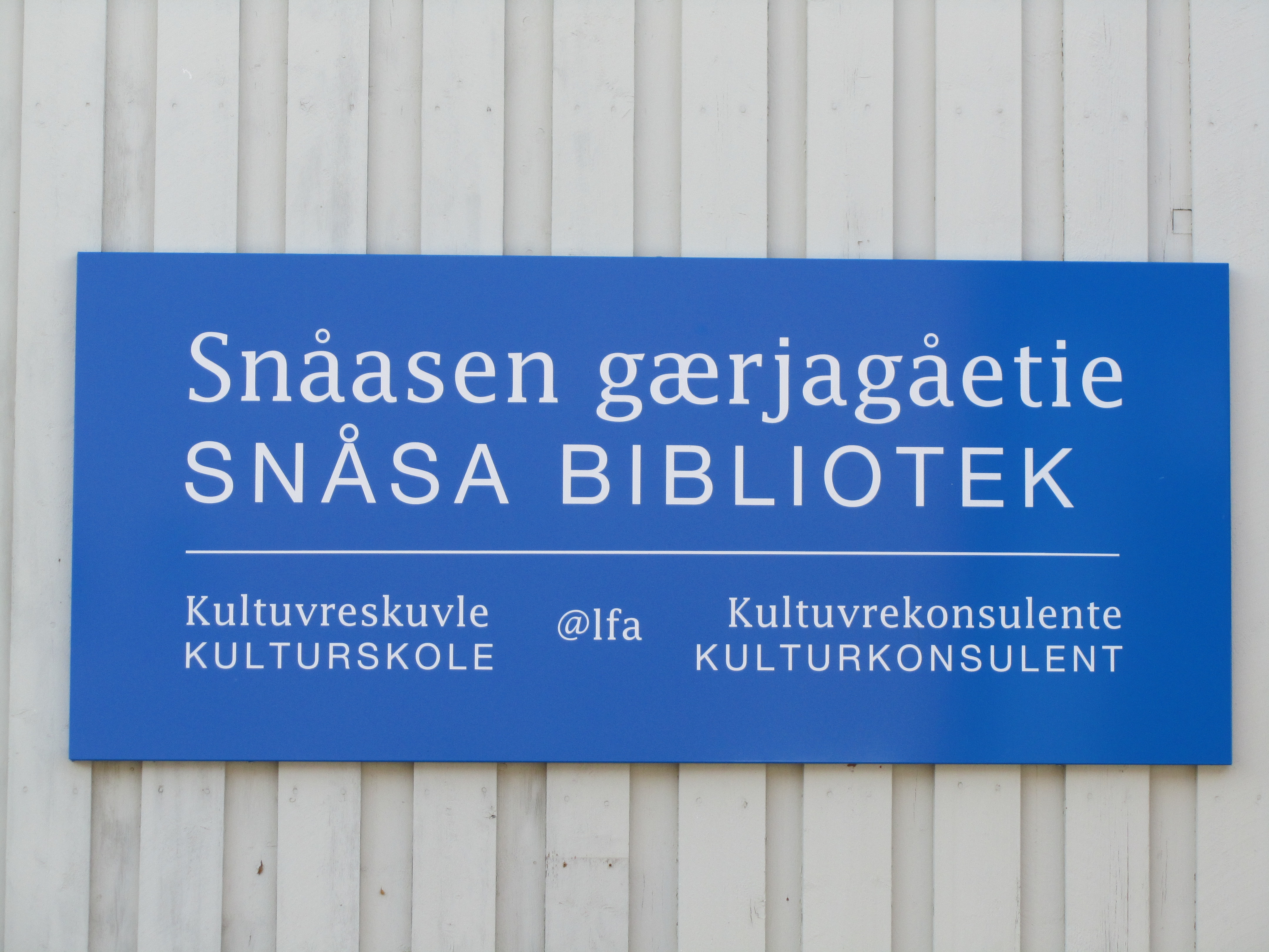 Snåasen gærjagåetie/Snåsa bibliotek.